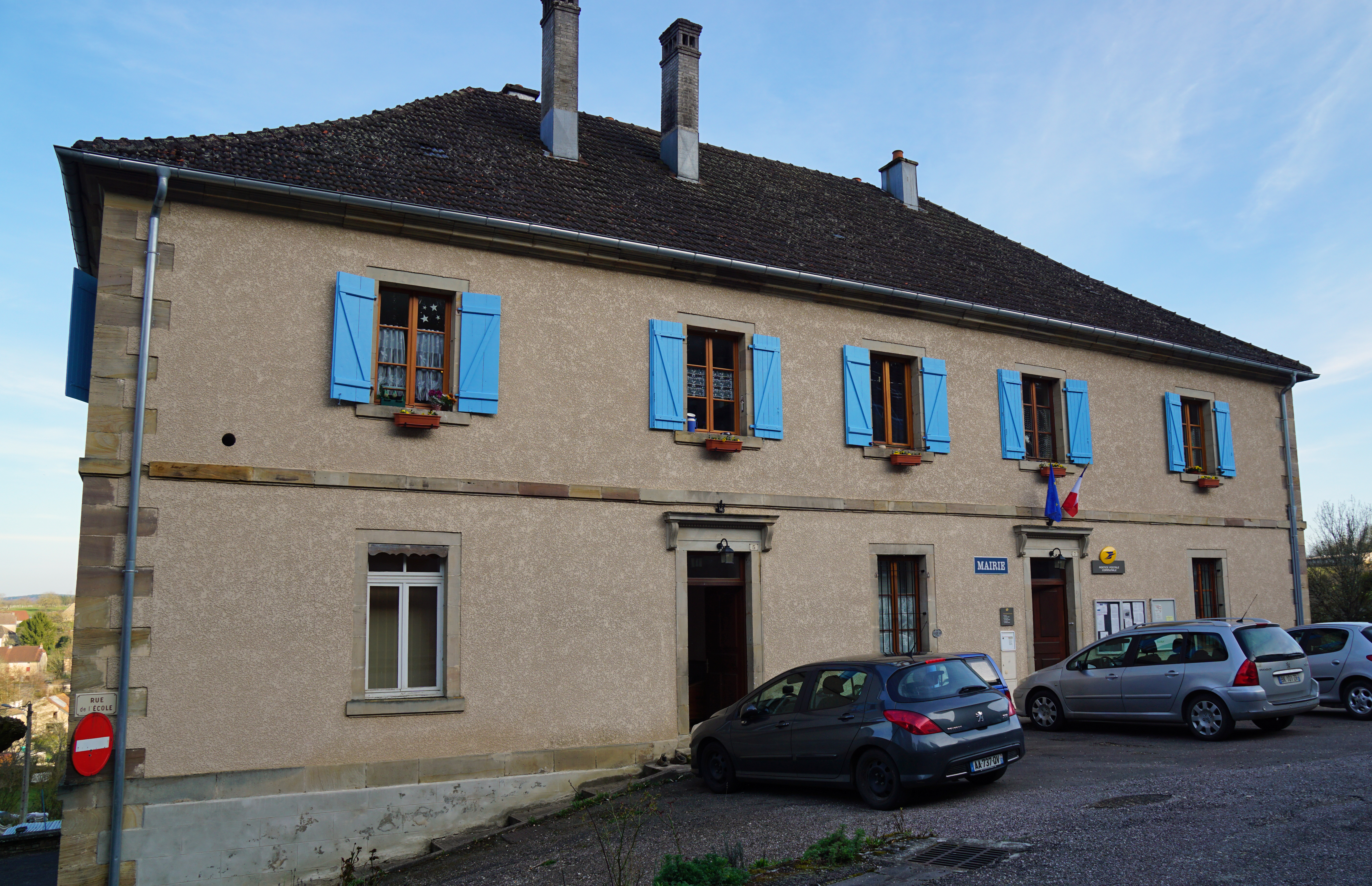 Gouhenans.